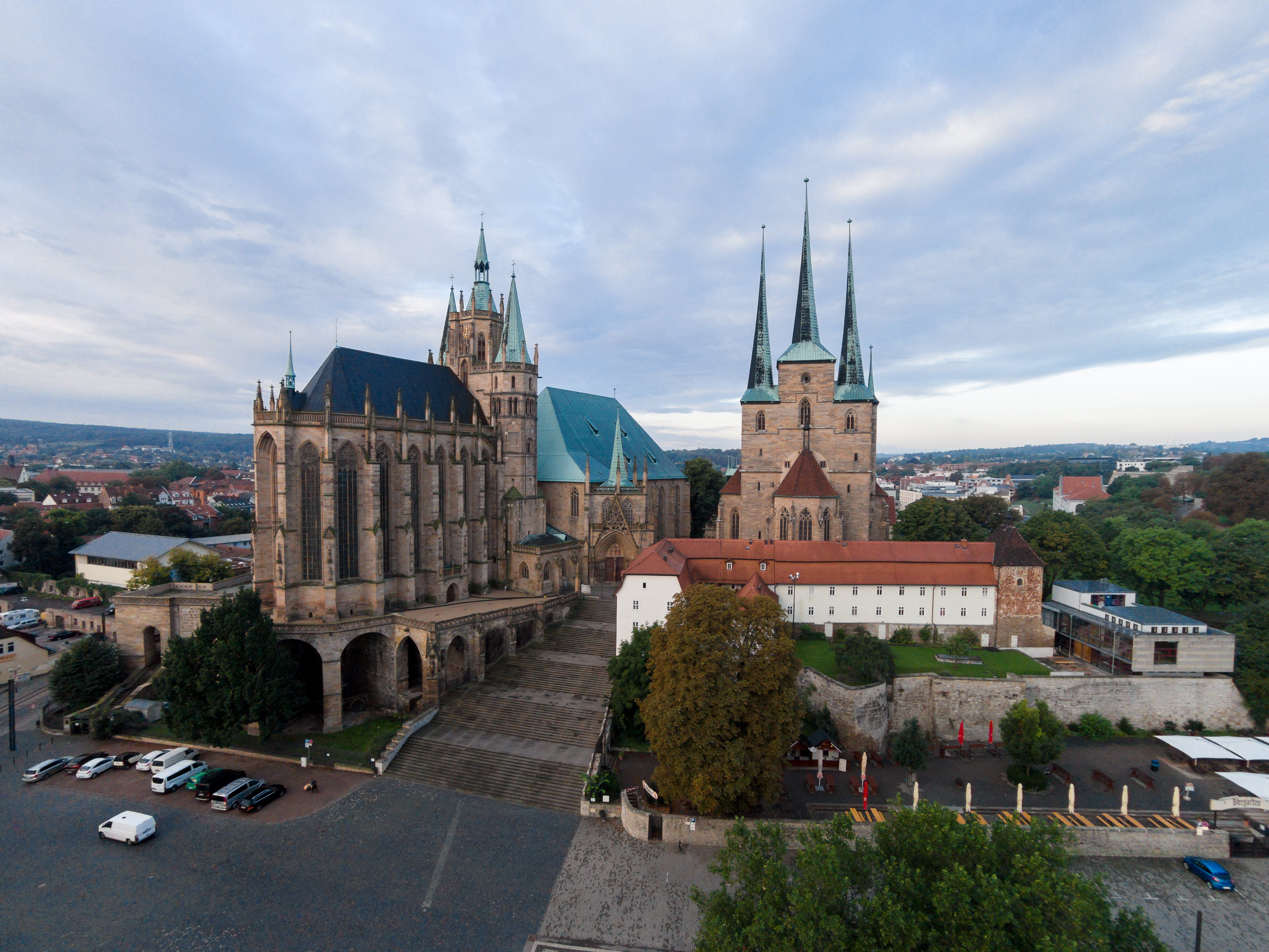 WLM-Fototour Erfurt 2014 Dieses Foto wurde im Rahmen der WLM-Fototour 2014 in Erfurt erstellt, die vom 29. bis 31. August 2014 zum Auftakt des Wettbewerbs Wiki Loves Monuments 2014 statt fand. The making of this document was supported by the Community-Budget of Wikimedia Germany. Erfurter Dom